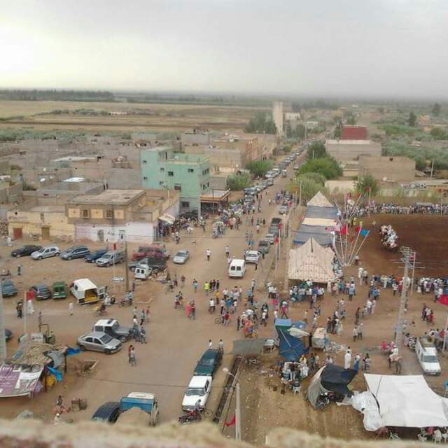 دوار أيت علي من فوق الصومعة أثناء مهرجان أيت علي 2014